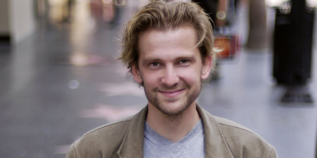 Jeka21